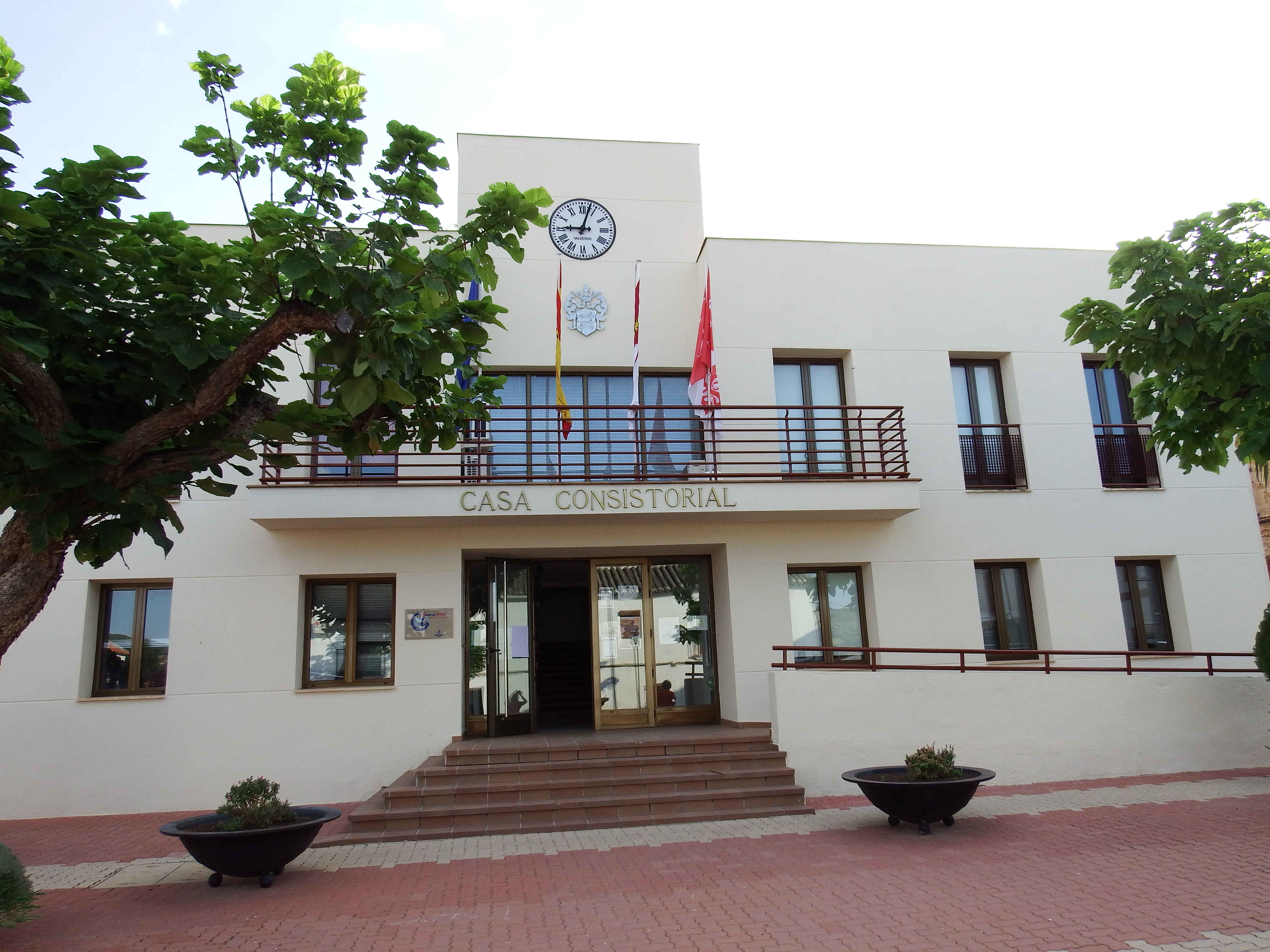 Ballesteros de Calatrava, Ayuntamiento.